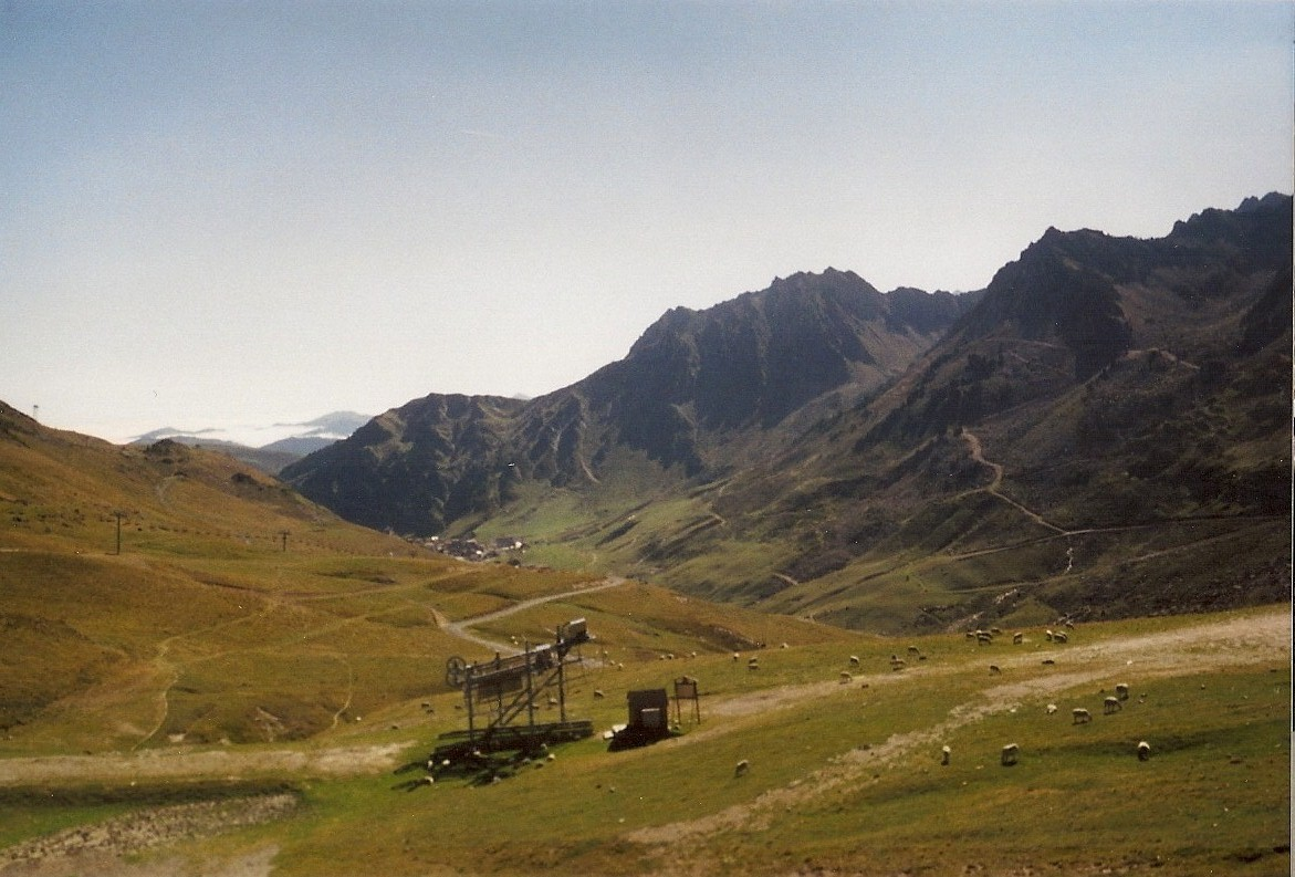 Vue au col du Tourmalet